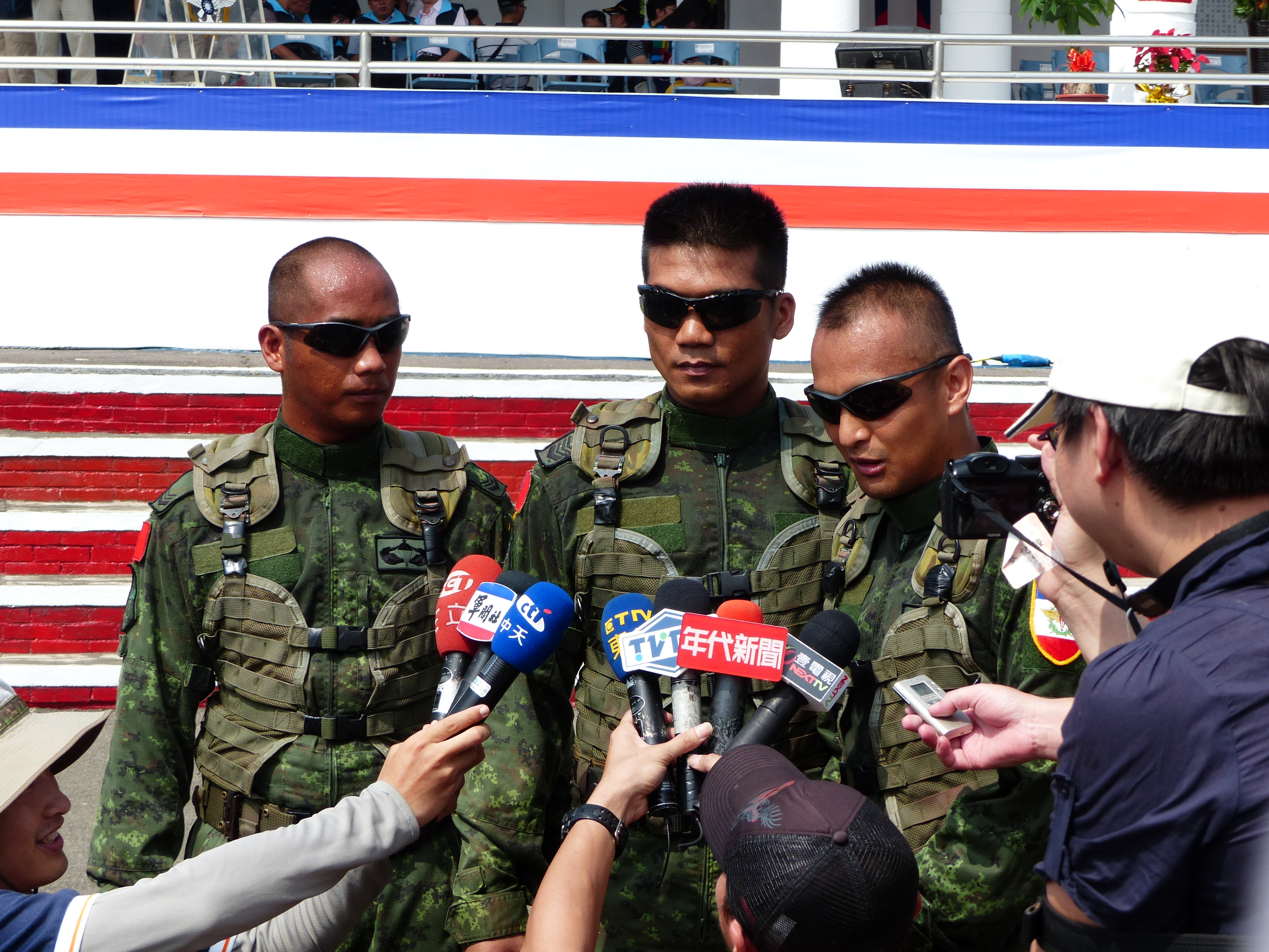 接受媒體訪問中的空降特戰營隊伍代表。有麥克風牌的媒體：三立新聞、軍聞社、中天新聞、東森新聞、TVBS新聞、年代新聞、壹電視。